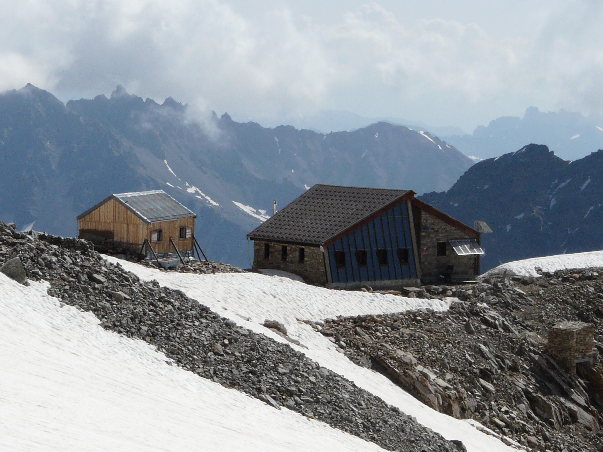 Vue du refuge